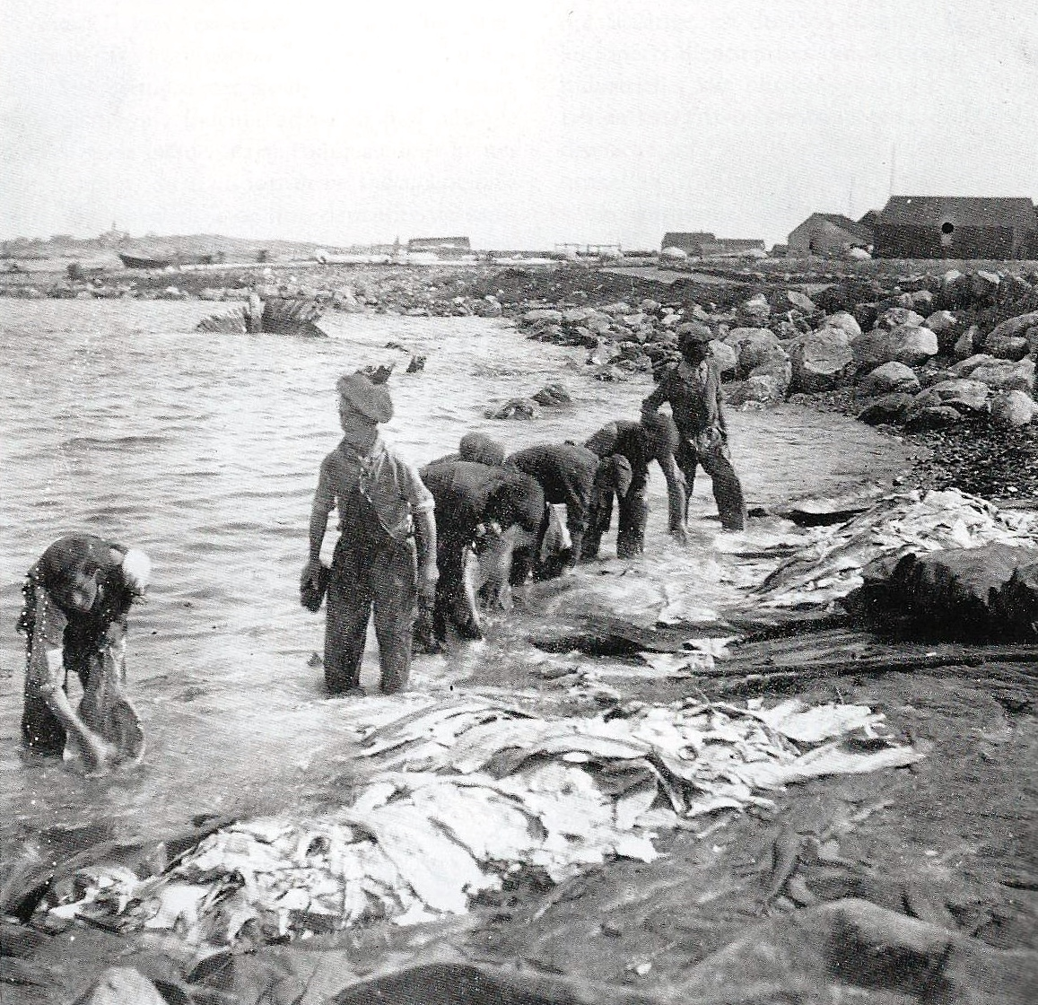 Graviers au travail vers 1904 (probablement à Saint-Pierre-et-Miquelon) (photographie de Mickaël Dhoste, musée d'ethnographie de l'université de Bordeaux).